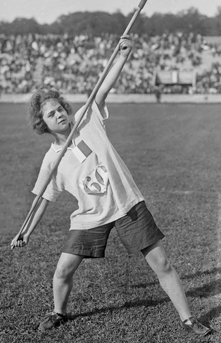 20-8-22, Mlle [Yvonne] Gancel, gagnante du lancement du javelot à une main [meeting international d'athlétisme féminin, stade Pershing] : [photographie de presse] / [Agence Rol]